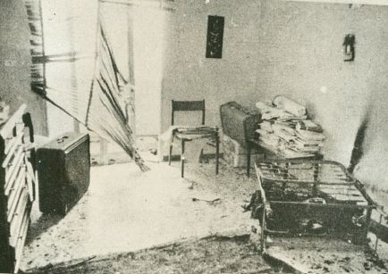 דירתו של כמאל עדוואן בבית הדירות בבירות לאחר ביקור אנשי סיירת מטכ"ל במסגרת מבצע אביב נעורים